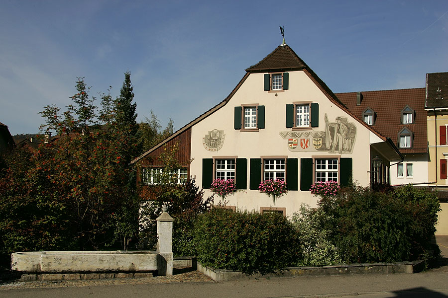 Heimatmuseum in Sissach